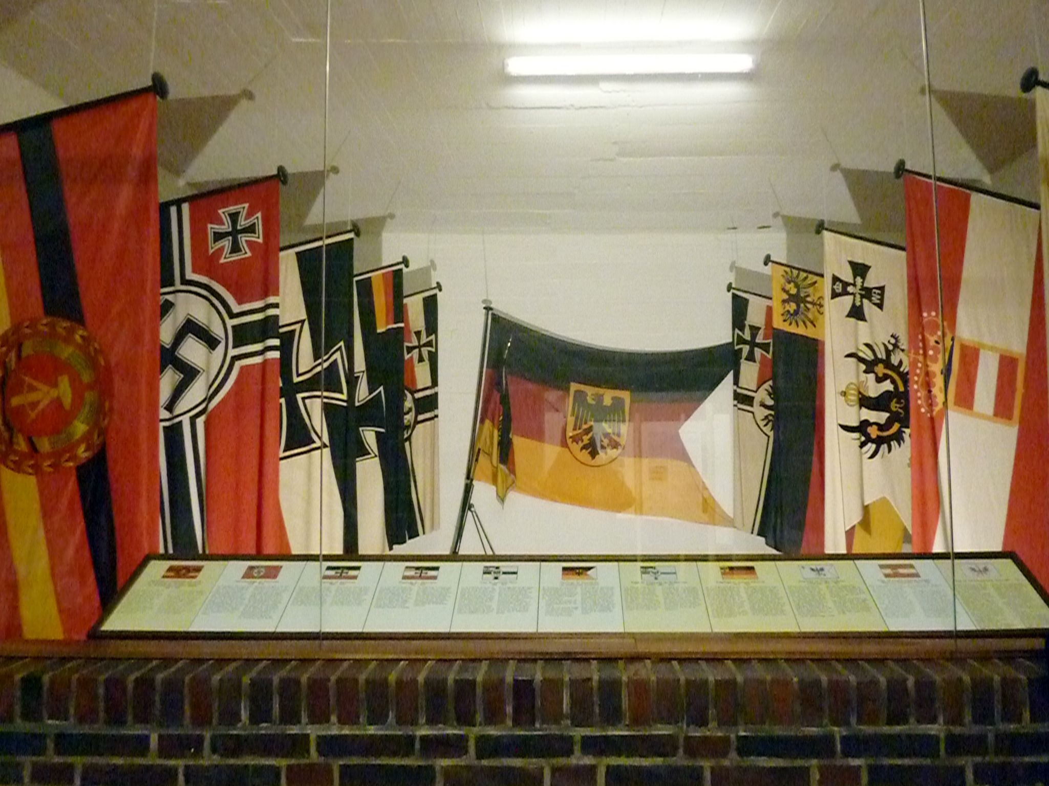 Historische Flaggen der deutschen Marine im Flaggenraum, von links nach rechts: Dienstflagge für Kampfschiffe und -boote der Volksmarine der Nationalen Volksarmee der DDR (1960-1990) Reichskriegsflagge der Kriegsmarine (1935-1945) Kriegsflagge der Reichsmarine (1938-1945) Kriegsflagge der Reichsmarine (1922-1933) Flagge der Kaiserlichen Marine (1903-1921) Dienstflagge der Seestreitkräfte der Bundesrepublik Deutschland Flagge der Kriegsmarine des Norddeutschen Bundes (1867-1903) Kriegsflagge der deutschen Reichsflotte (1848-1852) Kriegsflagge der Königlich-preußischen Kriegsmarine (1819-1867) Flagge der kaiserlich-königlichen Österreich-Ungarischen Kriegsmarine (1786-1918) Flagge der Kurbrandenburgischen Marine (1657-1701)